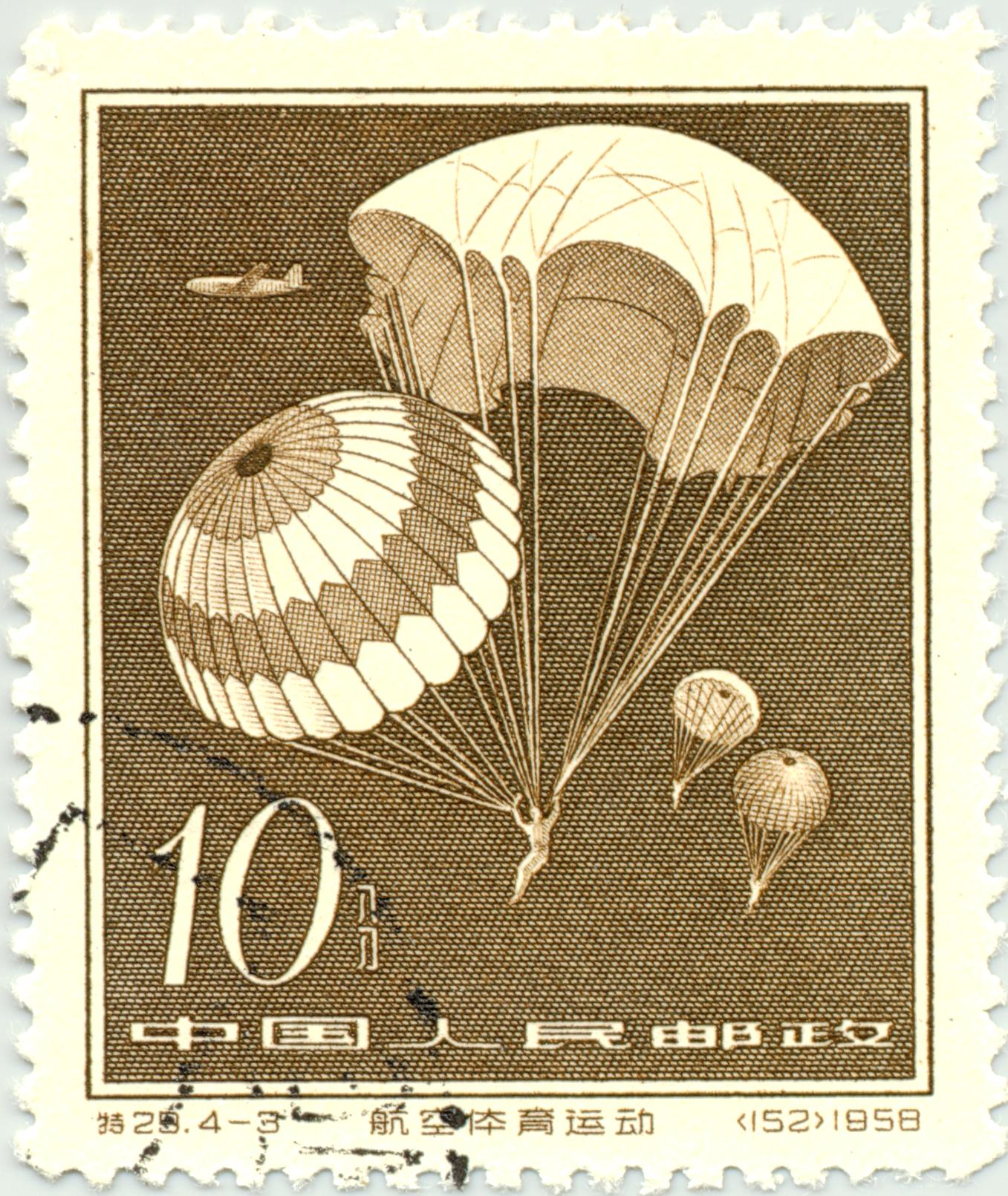 Chinese postage stamp, denomination 10, parachutists